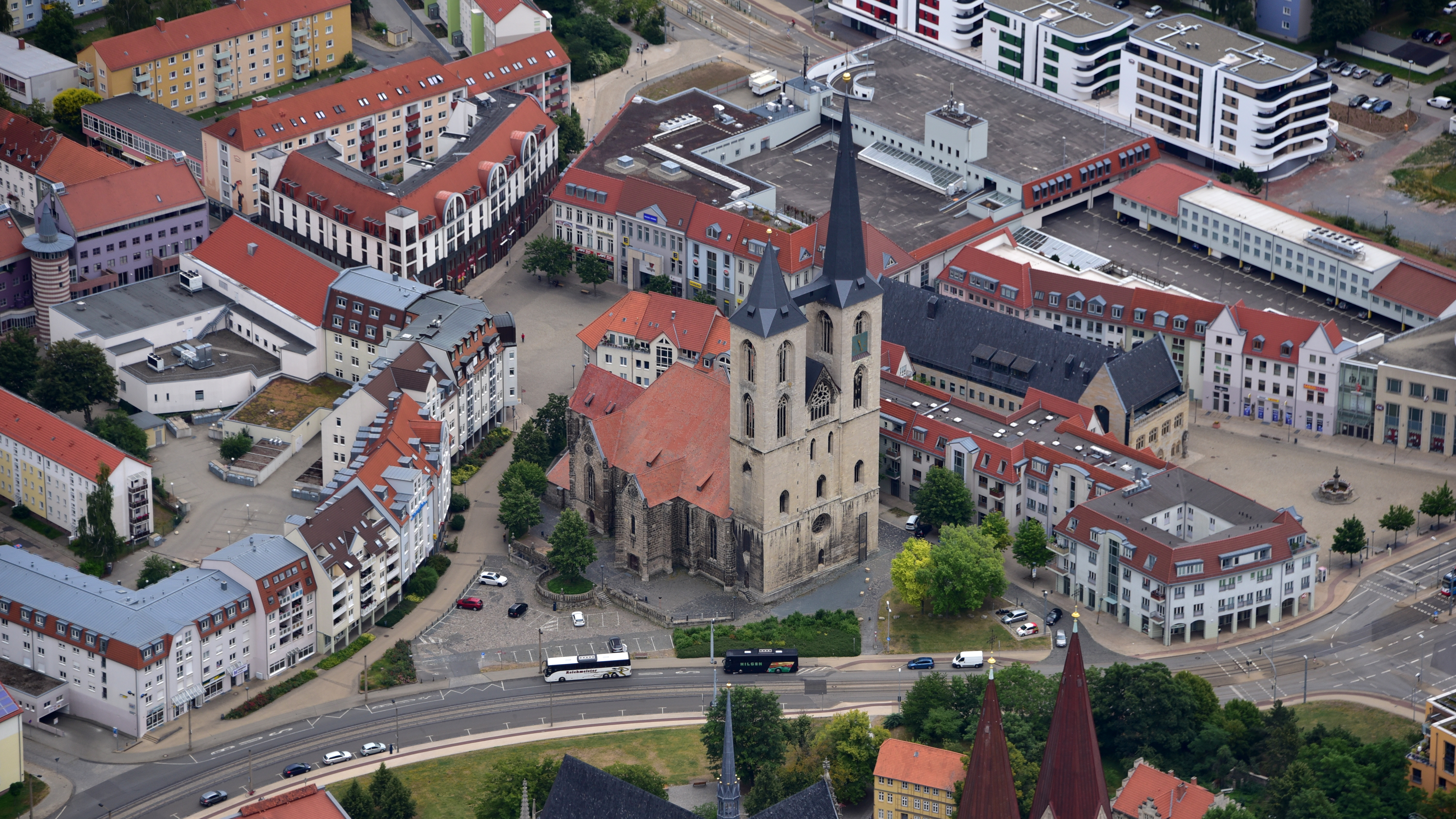 St. Martini (Halberstadt), Luftaufnahme (2019)